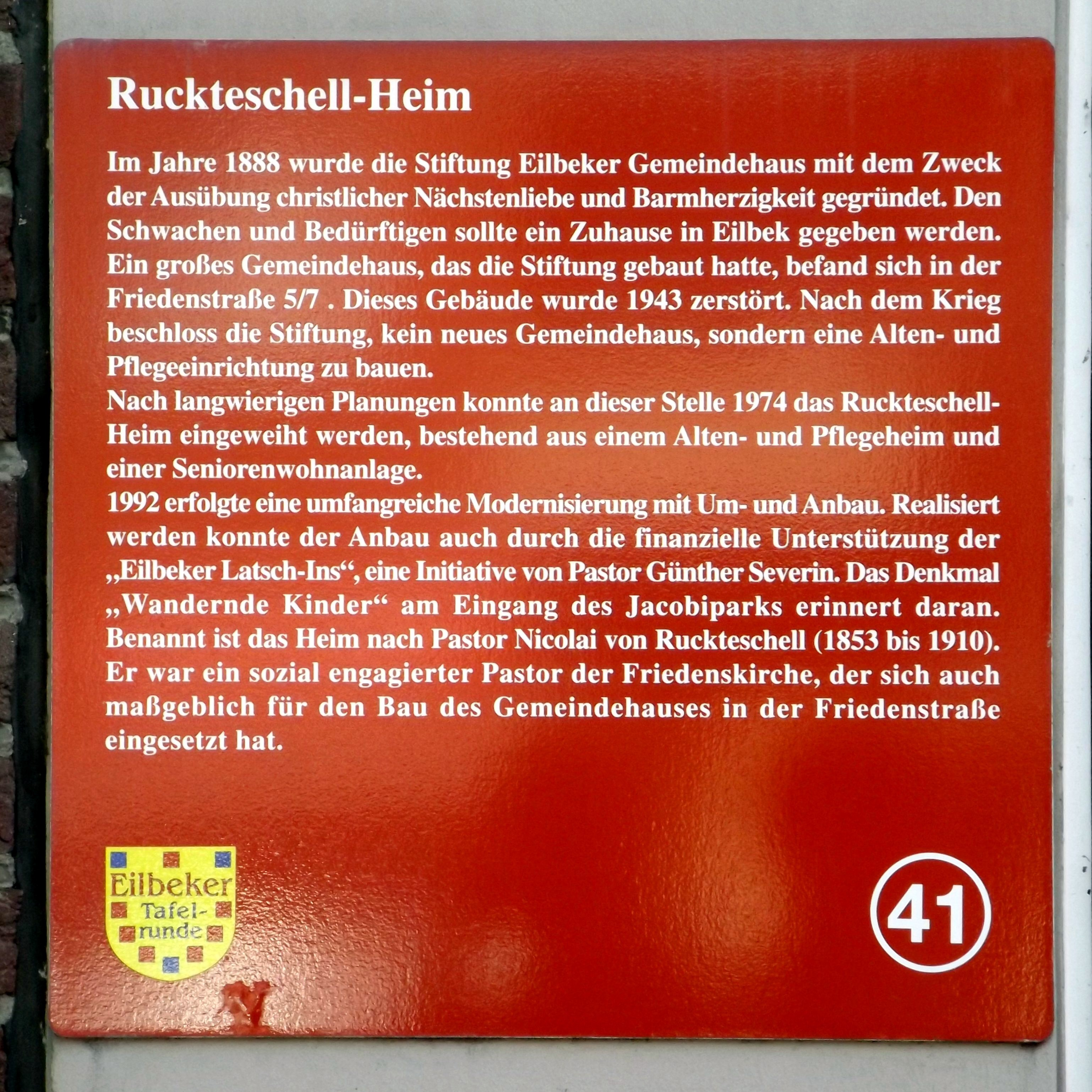 Eilbeker Tafelrunde Nr. 41: Ruckteschell-Heim, Ansicht von der Wandsbeker Chaussee zwischen Friedenstraße und Jacobipark